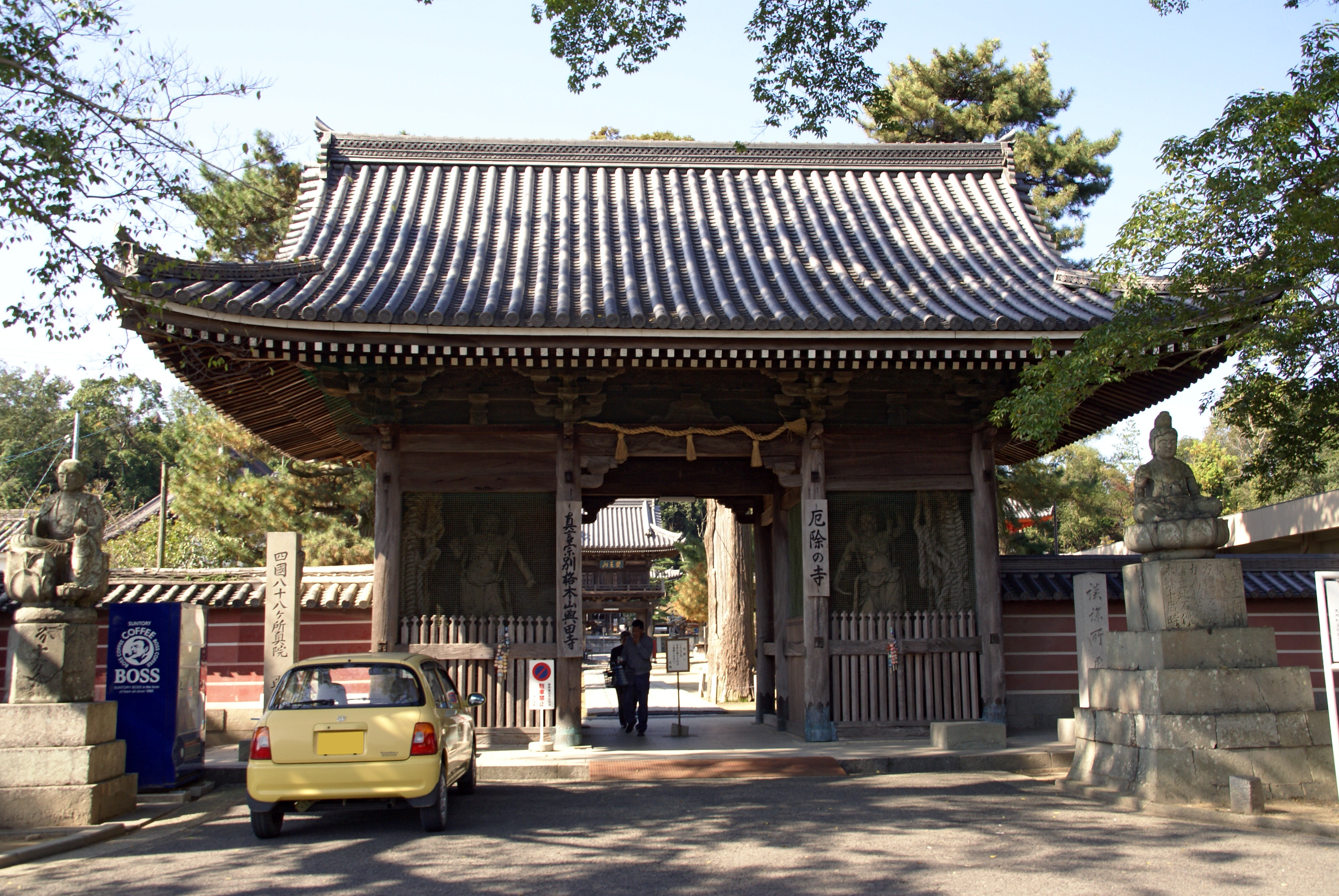 Yodaji in Higashikagawa, Kagawa prefecture, Japan